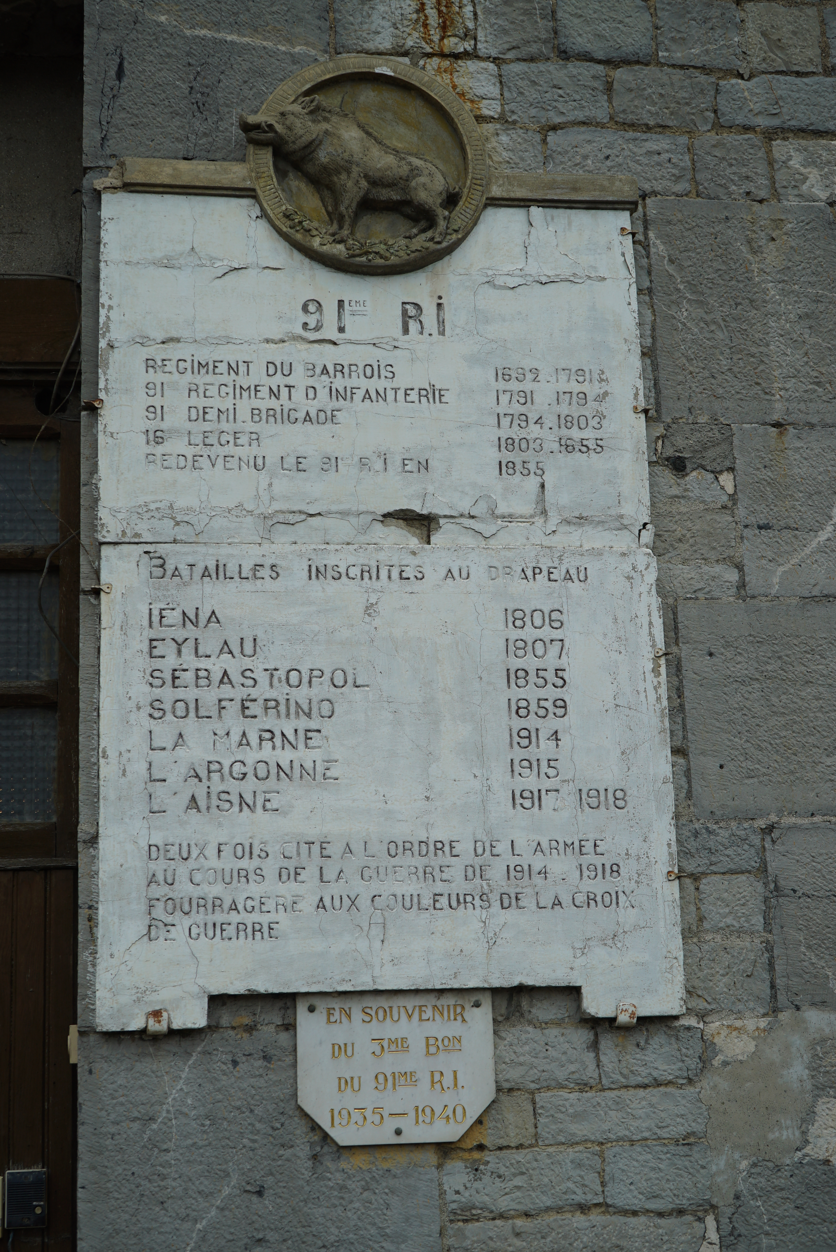 ancienne caserne de Givet du 91e RI.